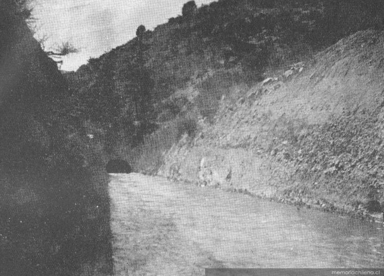 Entrada al tunel del canal Mallarauco, foto publicada en 1923